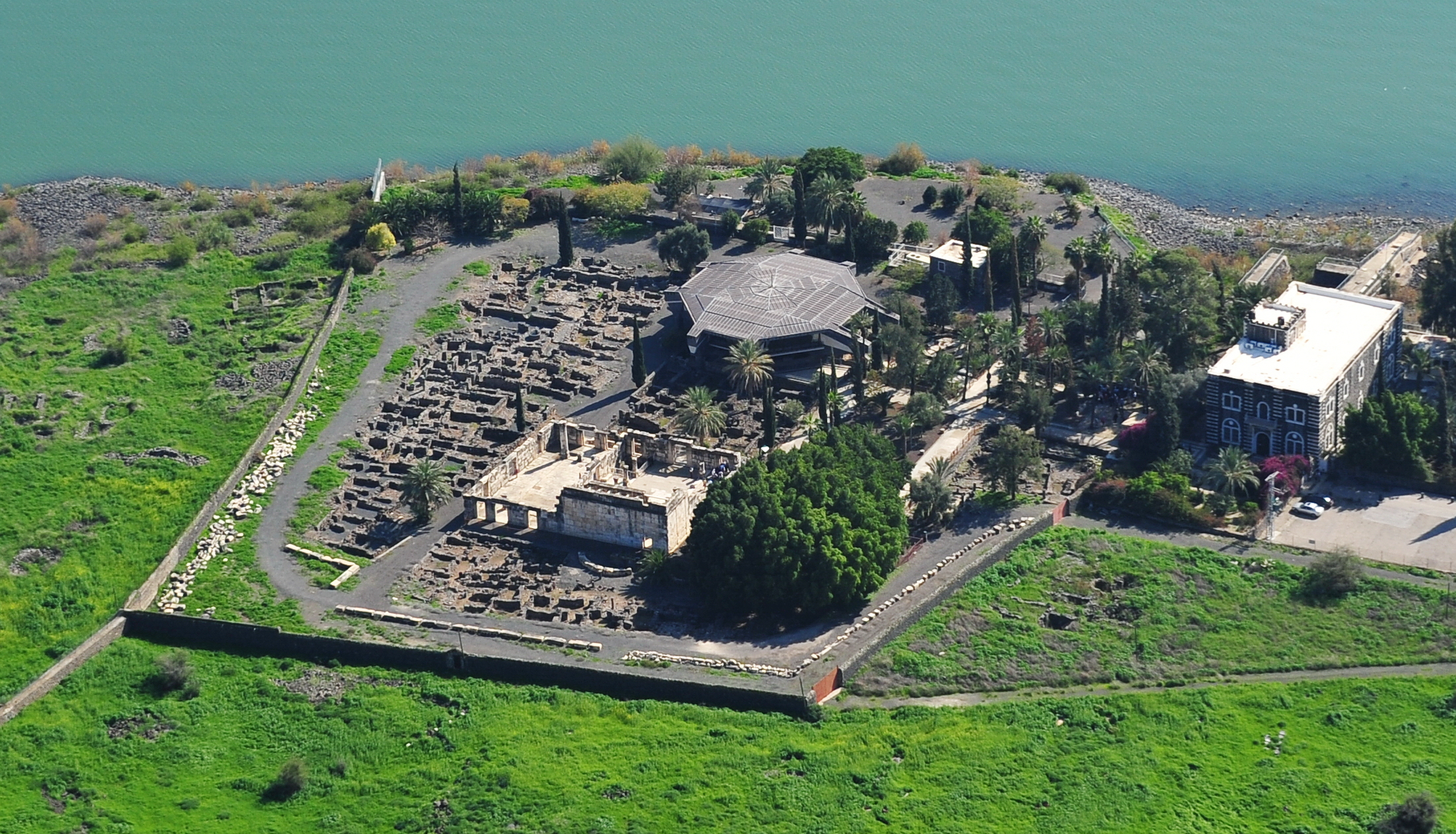 כפר נחום היה יישוב בחופה הצפוני של הכנרת, לא הרחק מכורזים, בבקעת עין שבע. כיום האתר הוא גן לאומי המשתרע על-פני שטח של 80 דונם.